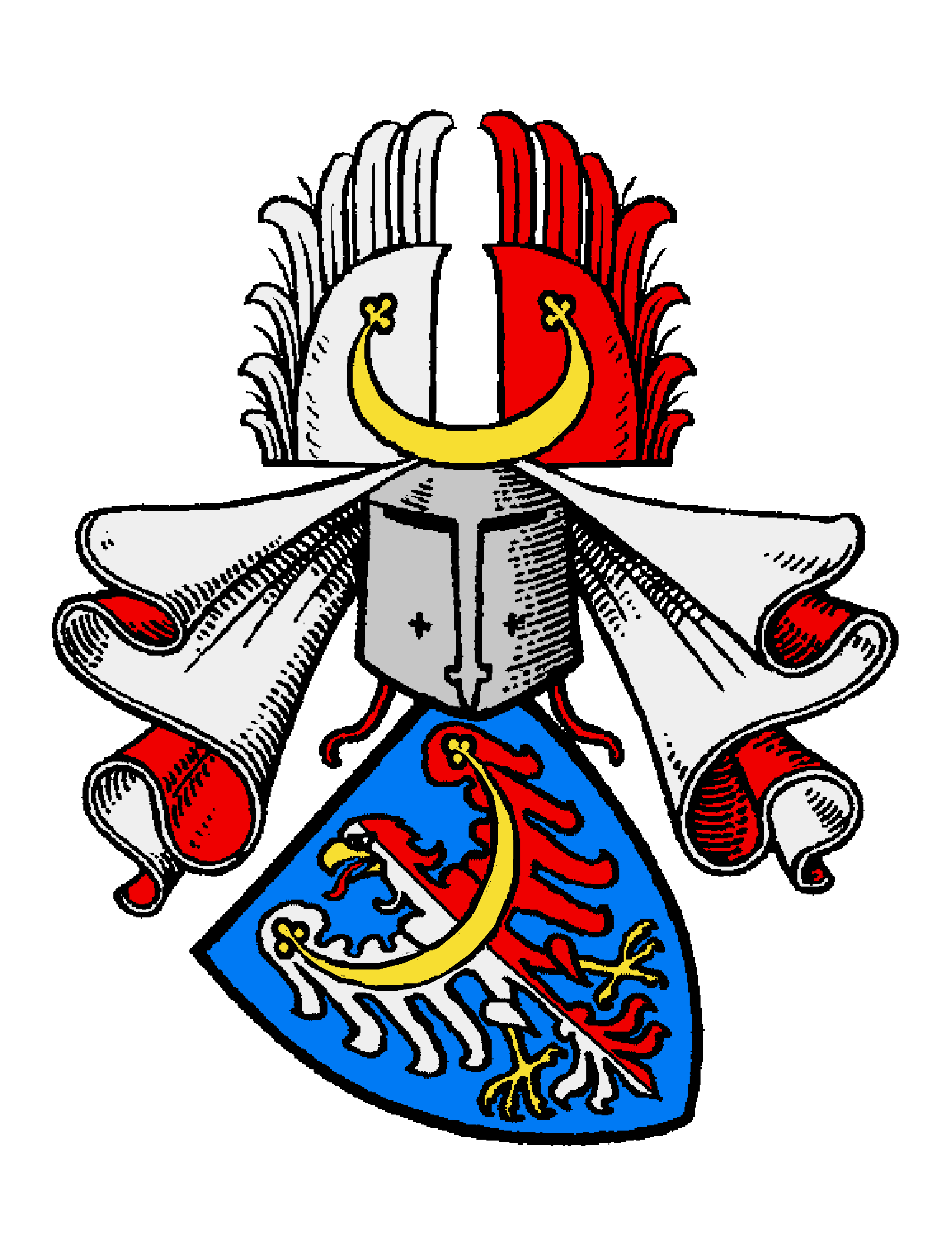 Wappen der Sahrer von Sahr, auch: Schdiar von Schdiar, gelegentlich auch von Saar, tschechisch: Žďárští ze Žďáru und alttschechisch: Zdiárský ze Zdiáru, lateinisch: de Sora oder de Sara, ist der Name eines böhmischen Uradelsgeschlechts mit gleichen Vorfahren wie die Herren und Reichsgrafen von Kolowrat, die Herren von Janovic (deutsch von Janowitz) oder die Herren von Vimperk (deutsch von Winterberg). Verwandtschaft besteht auch mit den Rittern und Grafen Čejka von Olbramovic (deutsch Czejka von Olbramowitz) sowie mit den Rittergeschlechtern Dvořecký von Olbramovic (deutsch Dvoretzky von Olbramowitz), Podolský von Olbramowitz und Zrucký von Chřenovic. → [1]